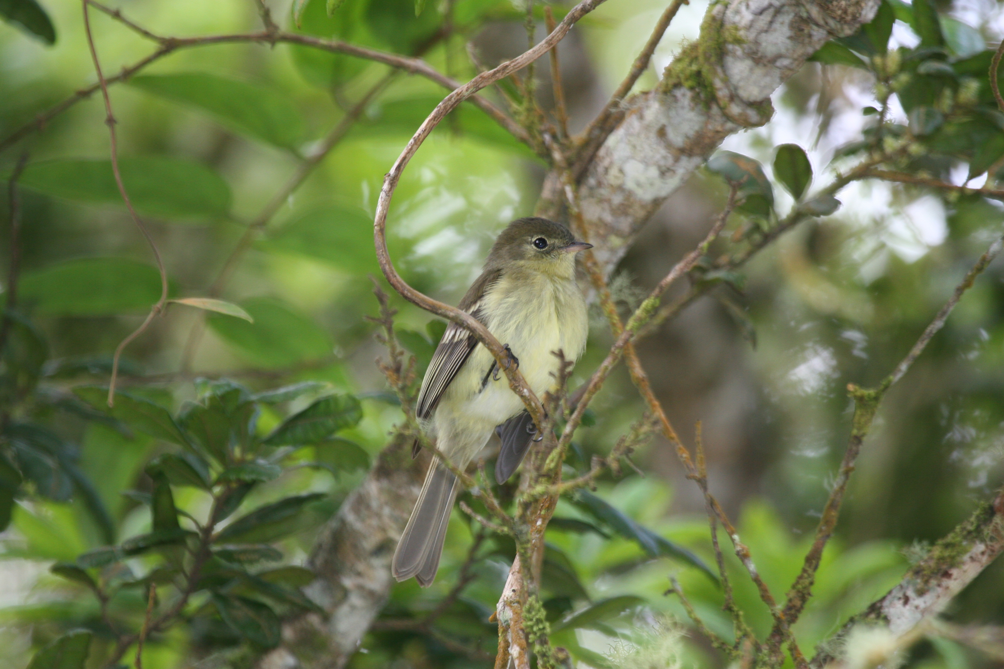 Greater Antillean Elaenia (Elaenia fallax) Dysmorodrepanis 12:53, 29 May 2008 (UTC)